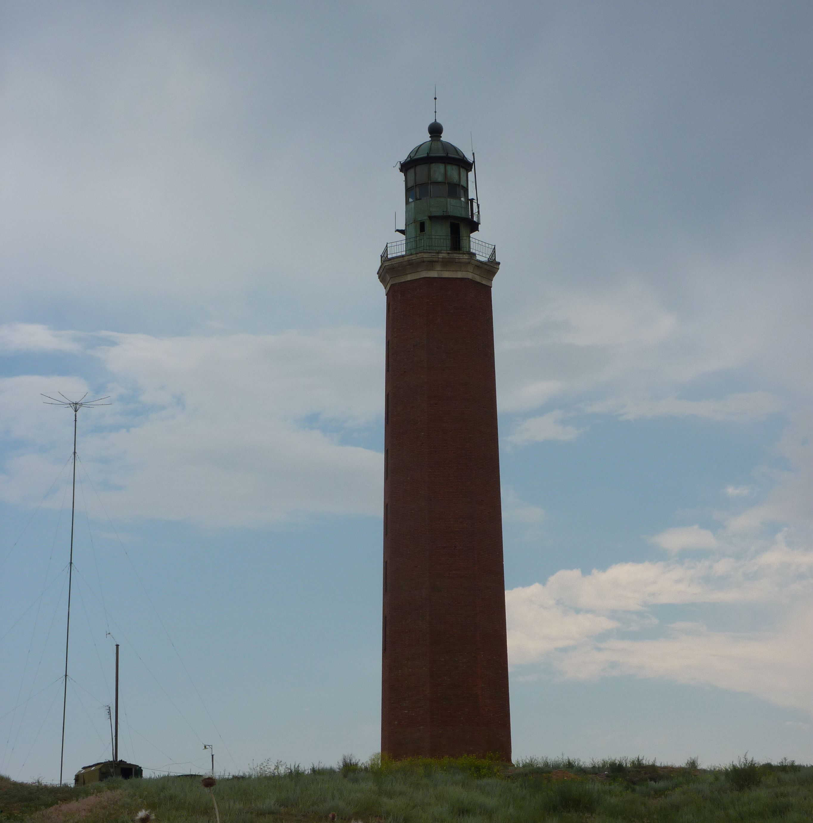 Der Leuchtturm Peters des Grossen beim Dorf Vyschka, Oblast Astrachan, Russland.